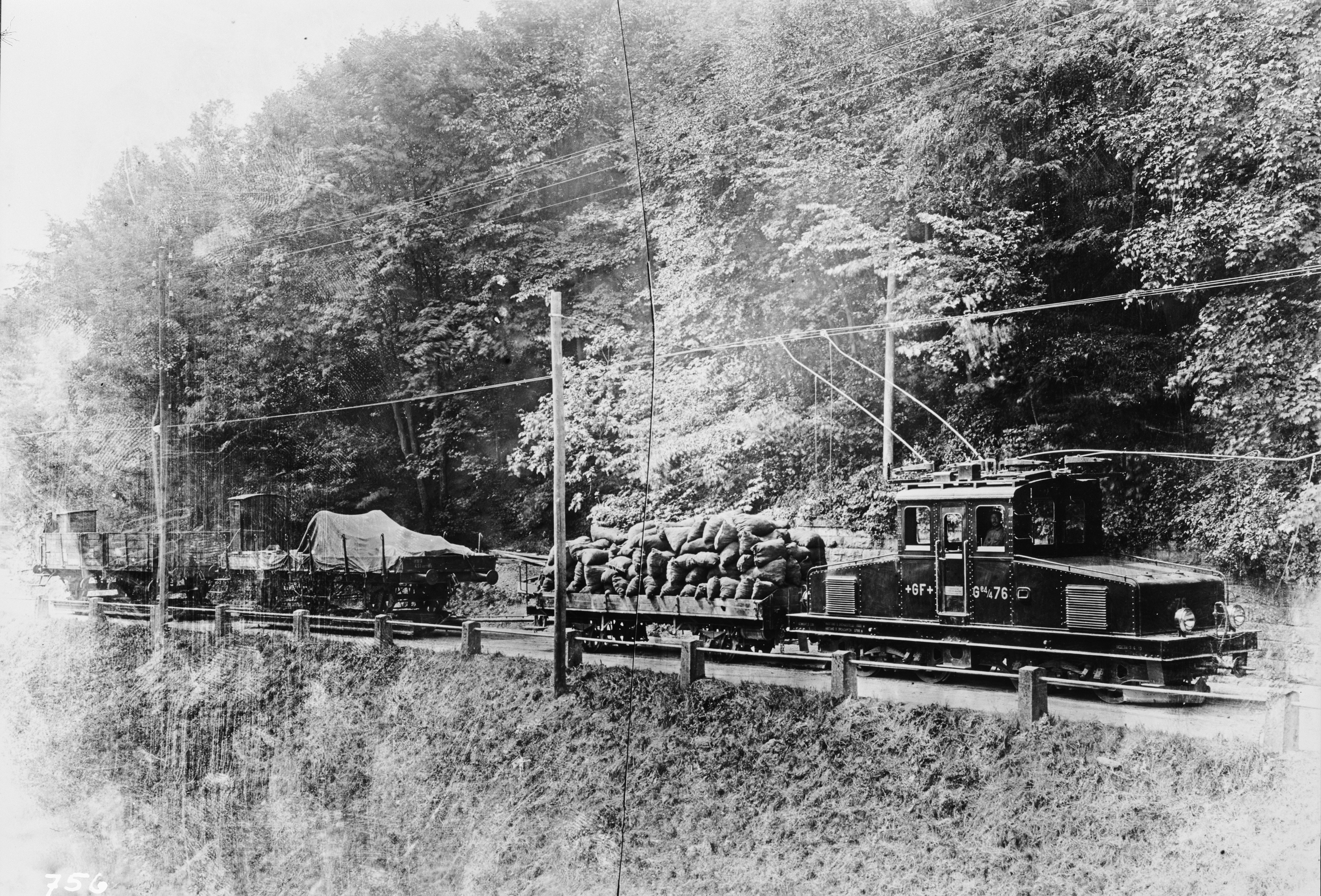 Güterbahn/Werkbahn der Georg Fischer AG unterwegs vom Birch ins Mühlental in Schaffhausen